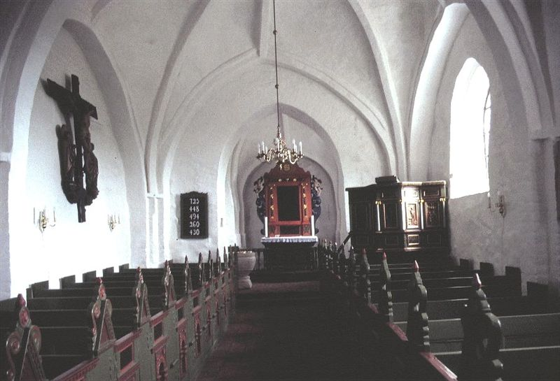 Vester Hjermitslev Kirke i Danmark. Skibet set mod øst